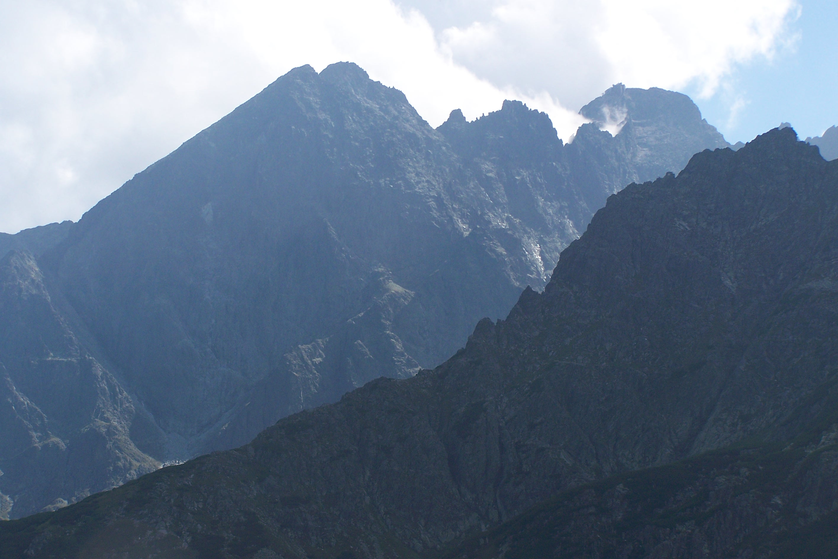 Kieżmarskie, Widły i Łomnica